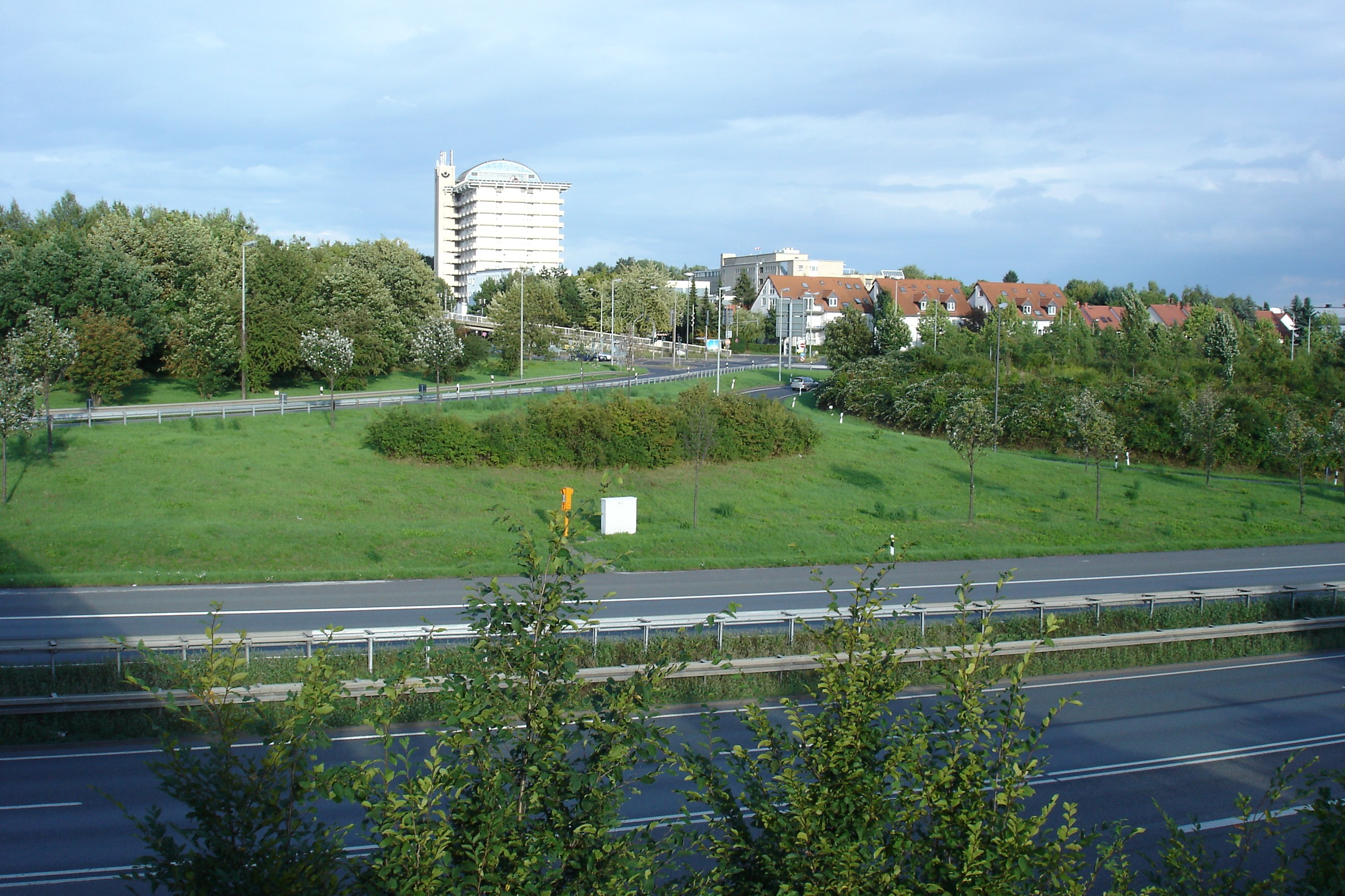 BG-Unfallklinik Ffm